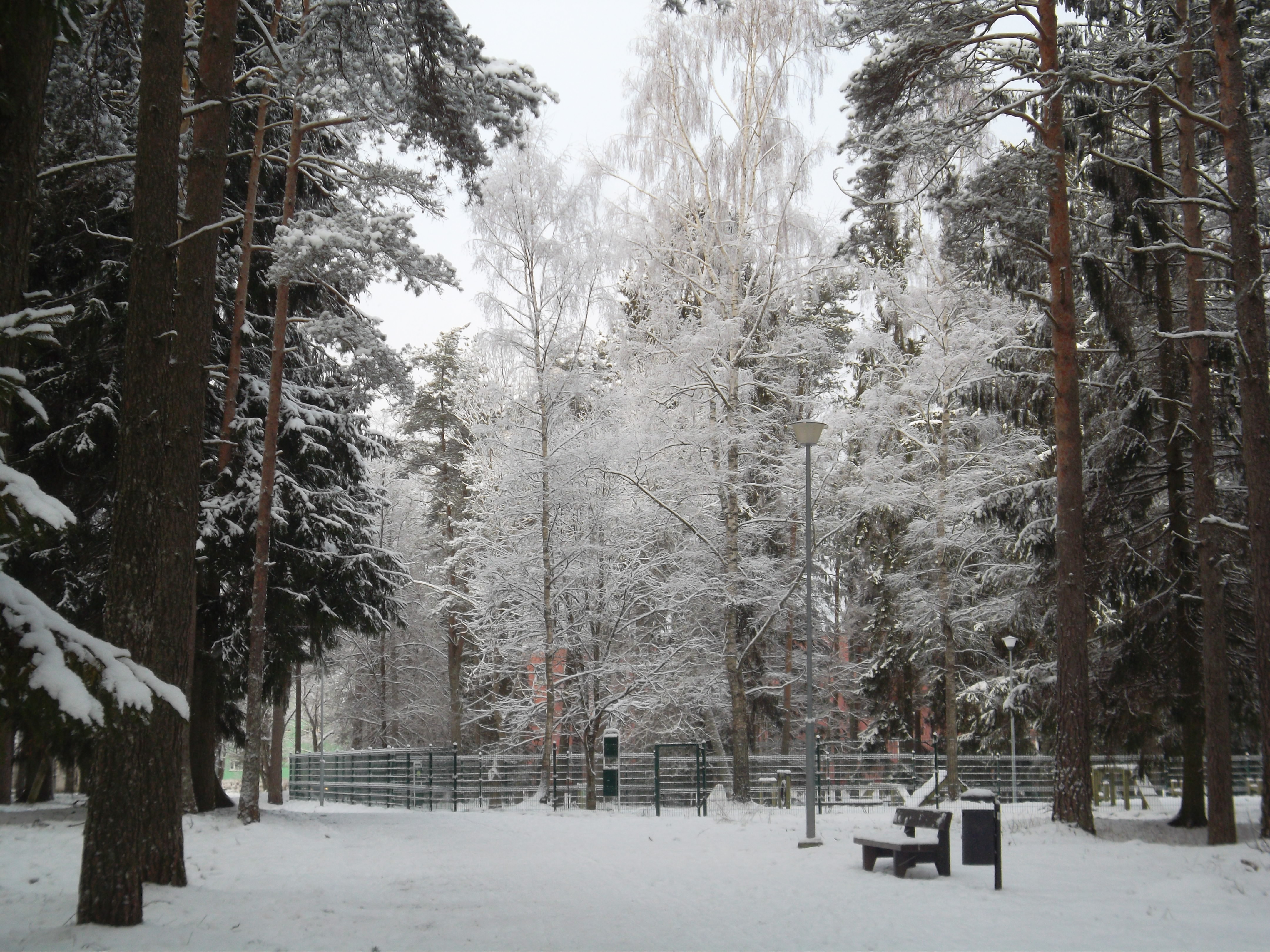 Лесопарк Капа зимой.